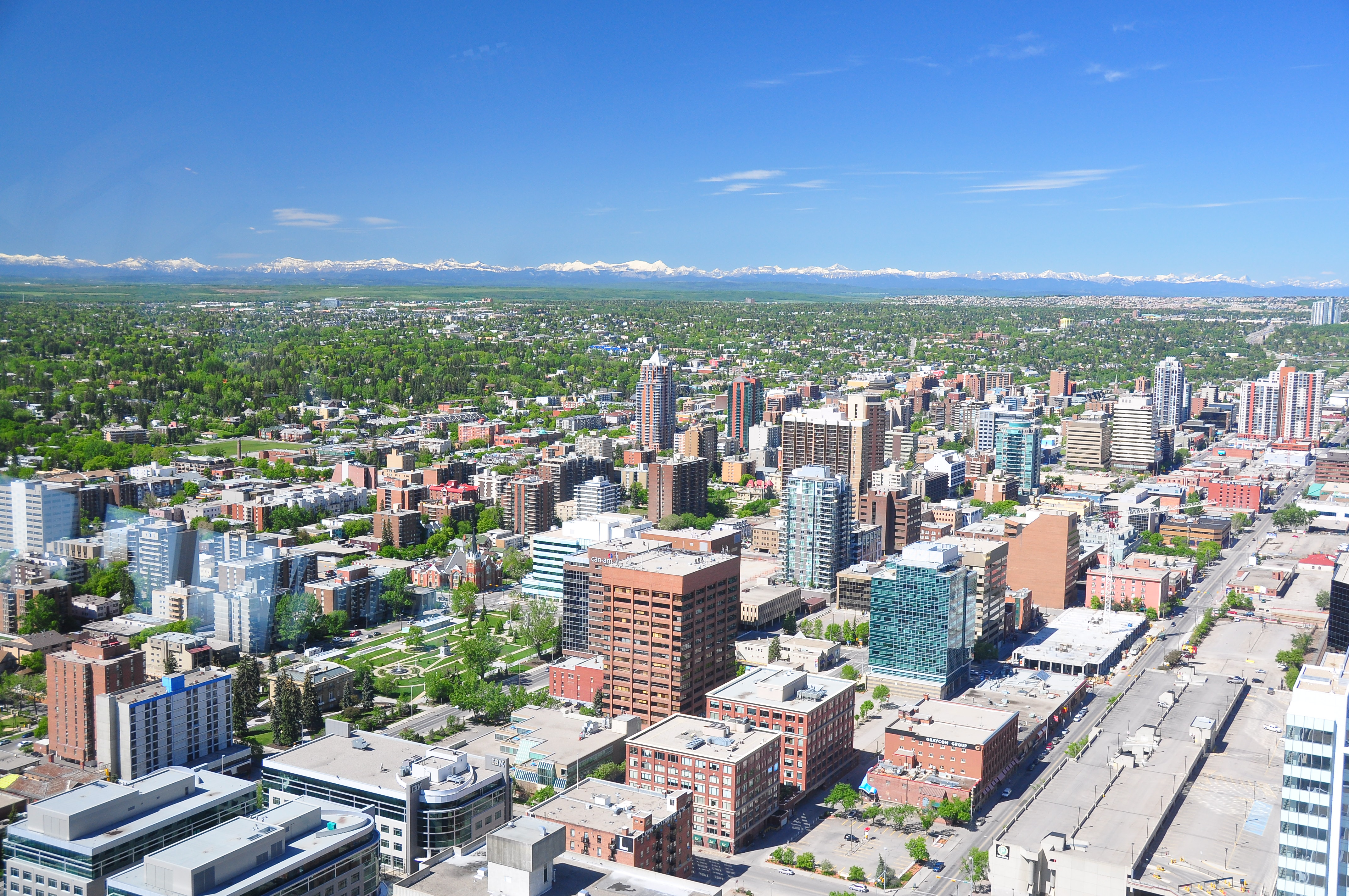 Calgary